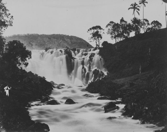 foto. Man poseert met hoed bij de waterval in de Tuntang-rivier bij Salatiga.. Waterval in de Tuntang-rivier bij Salatiga